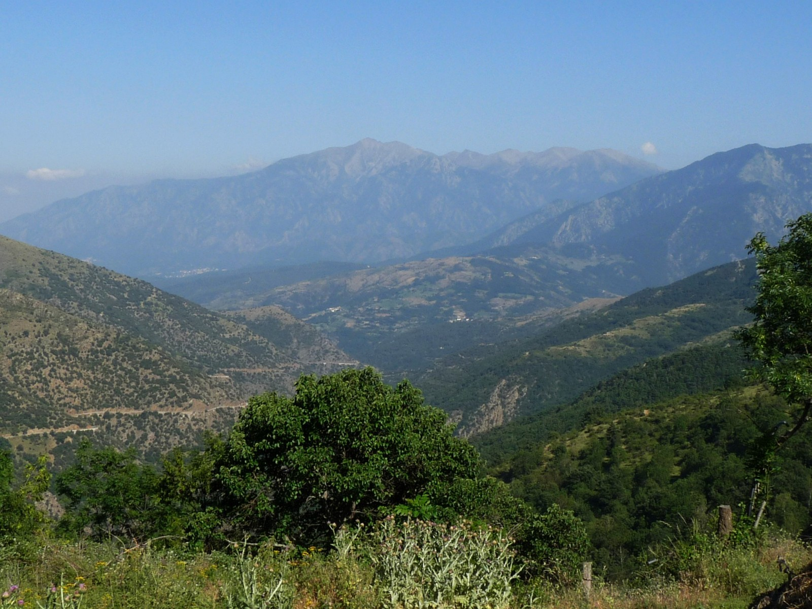 Le Canigou et les Garrotxes, vue depuis Talau, Pyrénées-Orientales, France